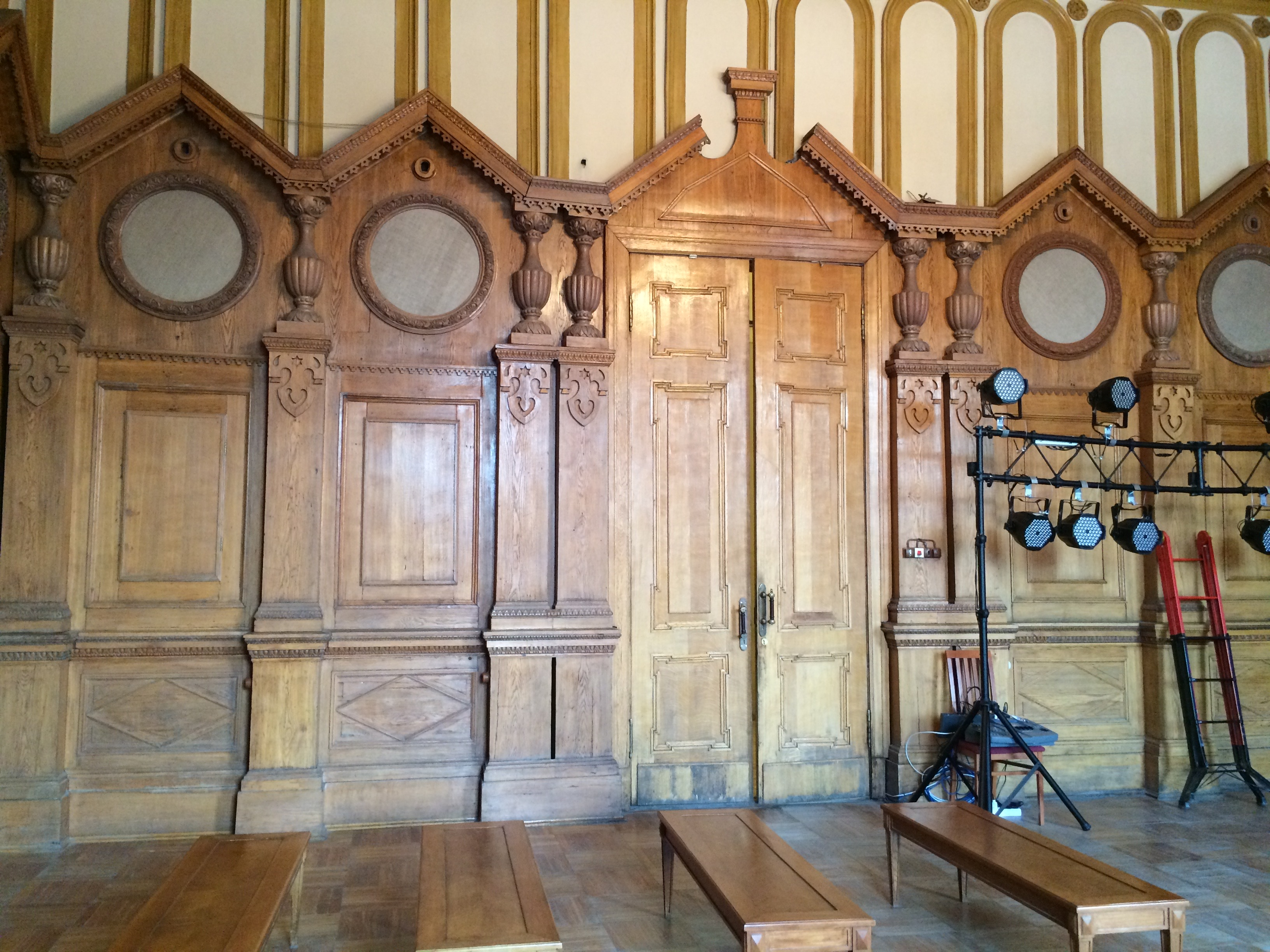 Помещение упраздненной церкви апостолов Петра и Павла в Михайловском замке (домовая церковь инженерного училища)